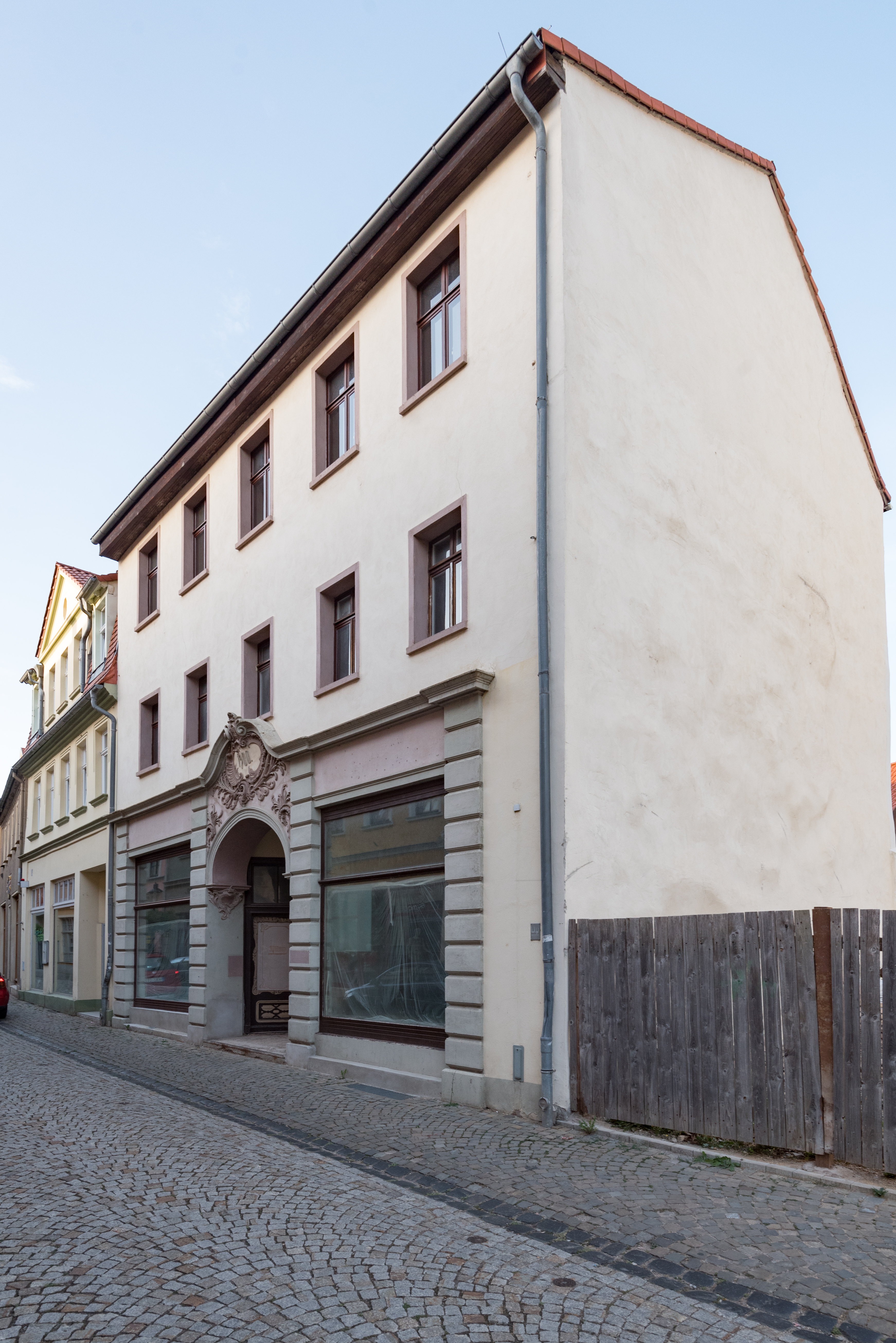 Naumburg (Saale), Wenzelsstraße 36